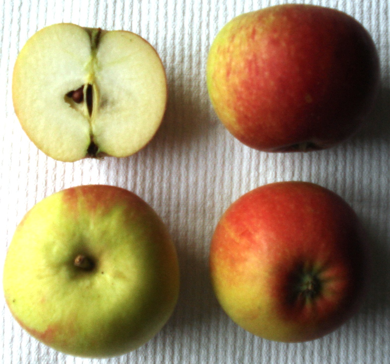 Äpfel der Sorte Alkmene